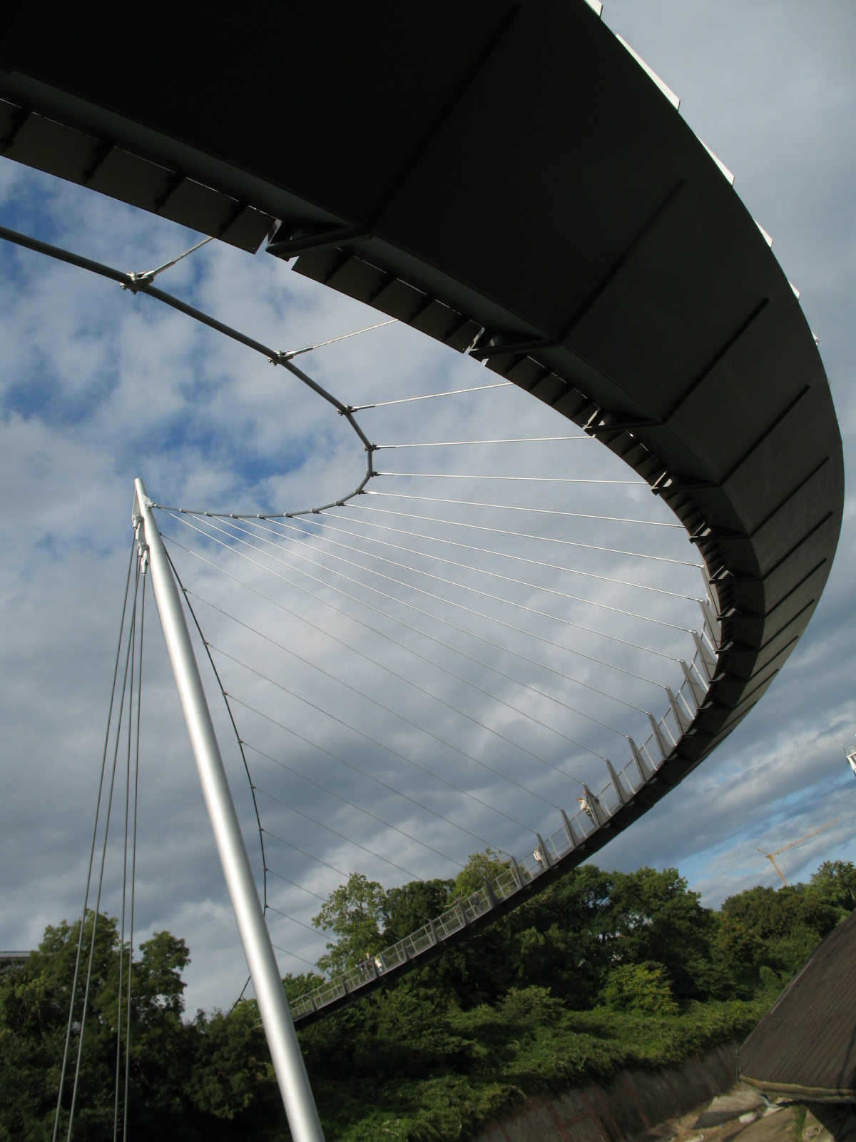 Fußgänger-Hängebrücke im Hafen von Sassnitz